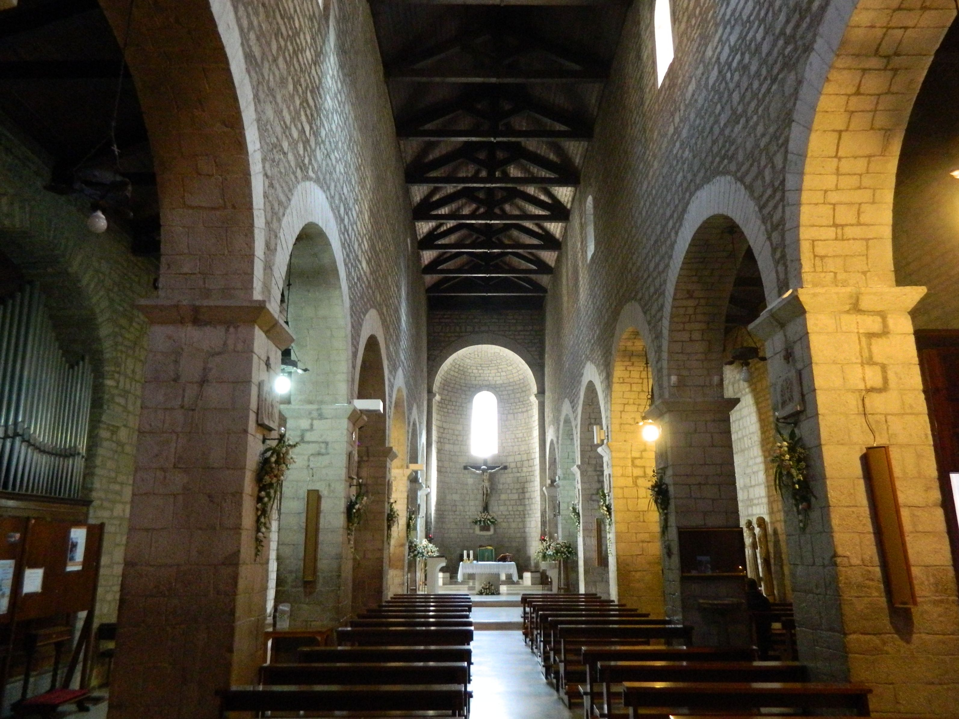 Chiesa di San Michele Arcangelo (Potenza) - Interno